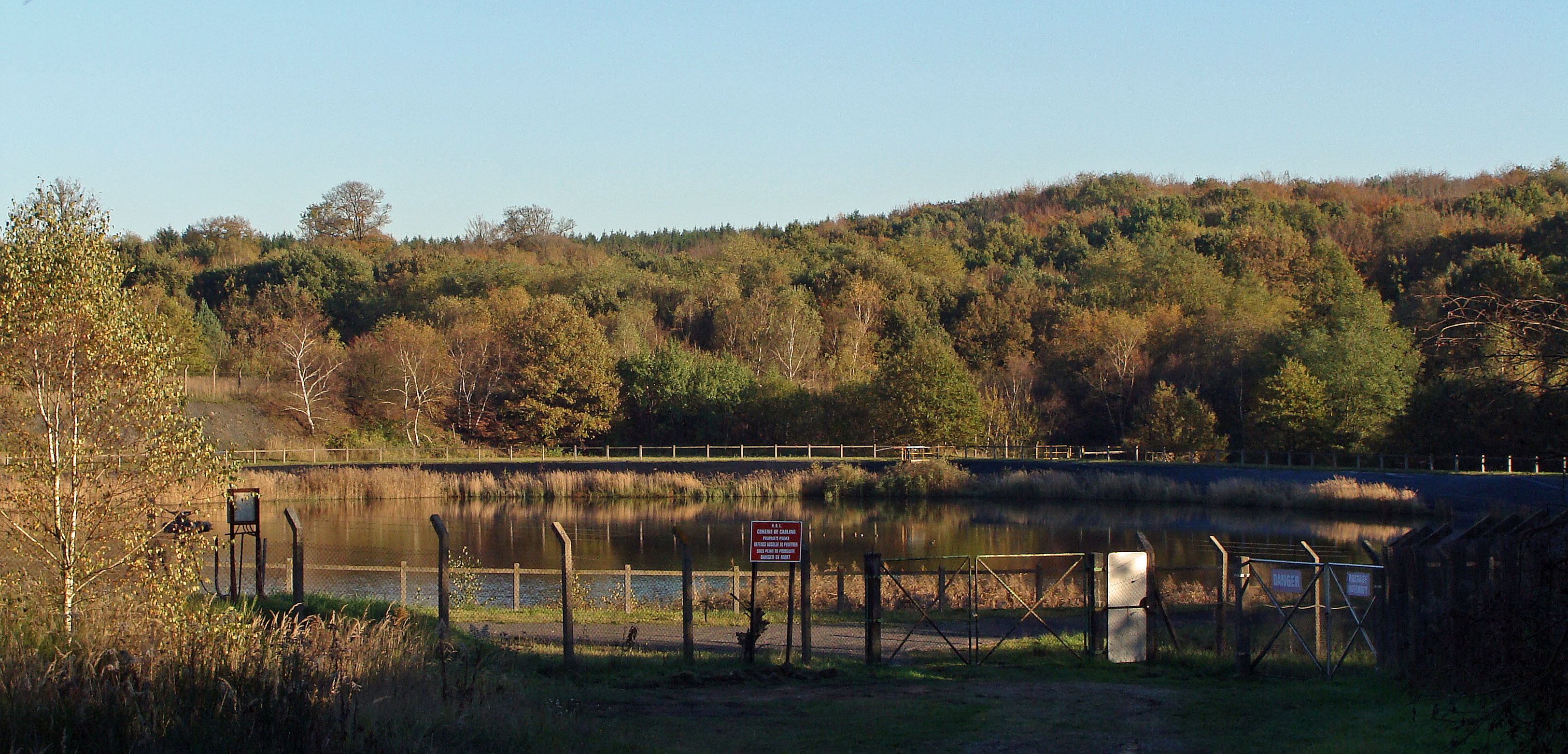 Bassin de décantation, L'Hôpital (Moselle). Une des sources du Merle. Eaux en provenance de la plate-forme chimique de Carling.